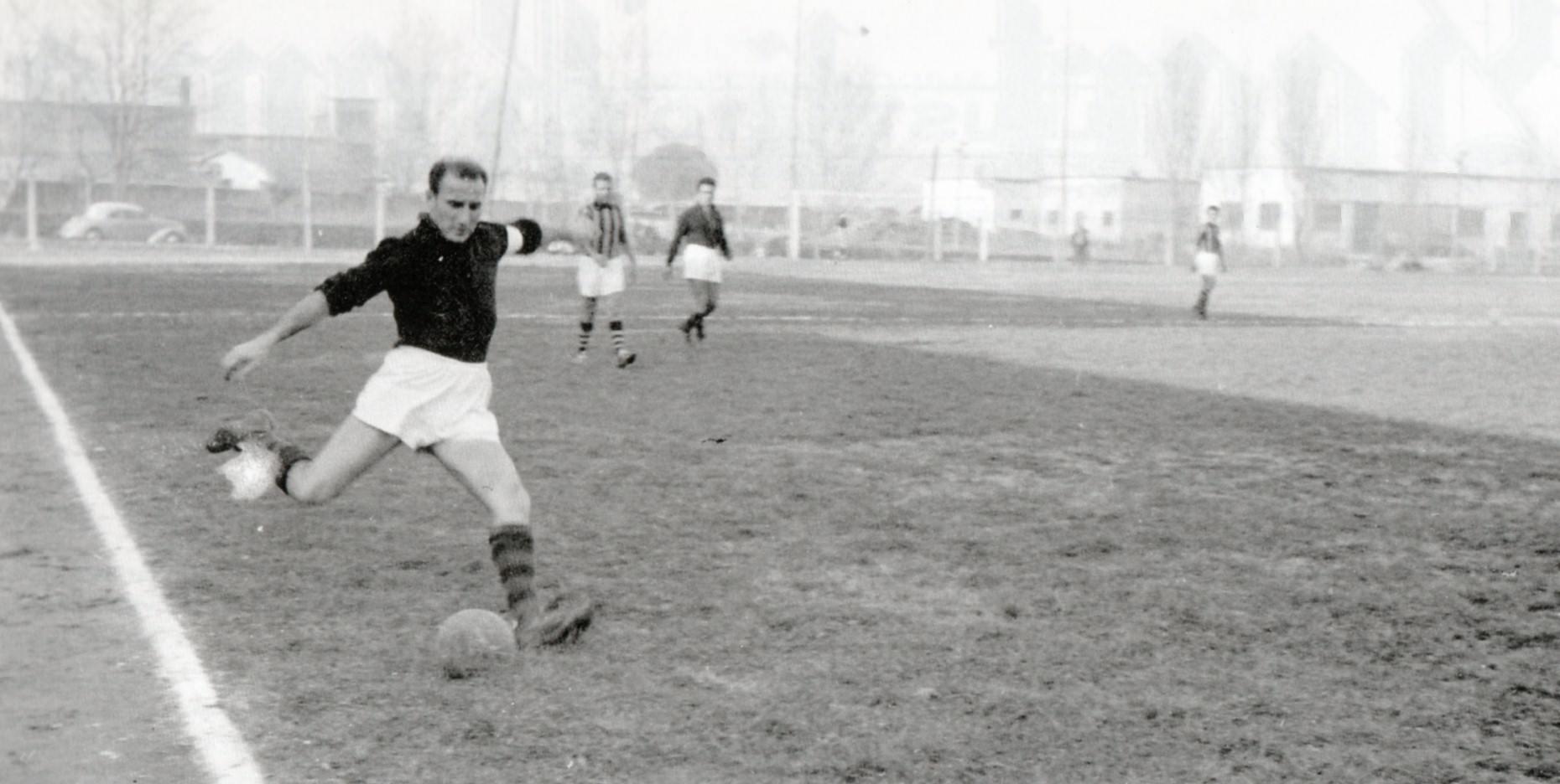 Ermes Borsetti in azione nella partita Piombino-Colleferro 1-3 21/01/1950